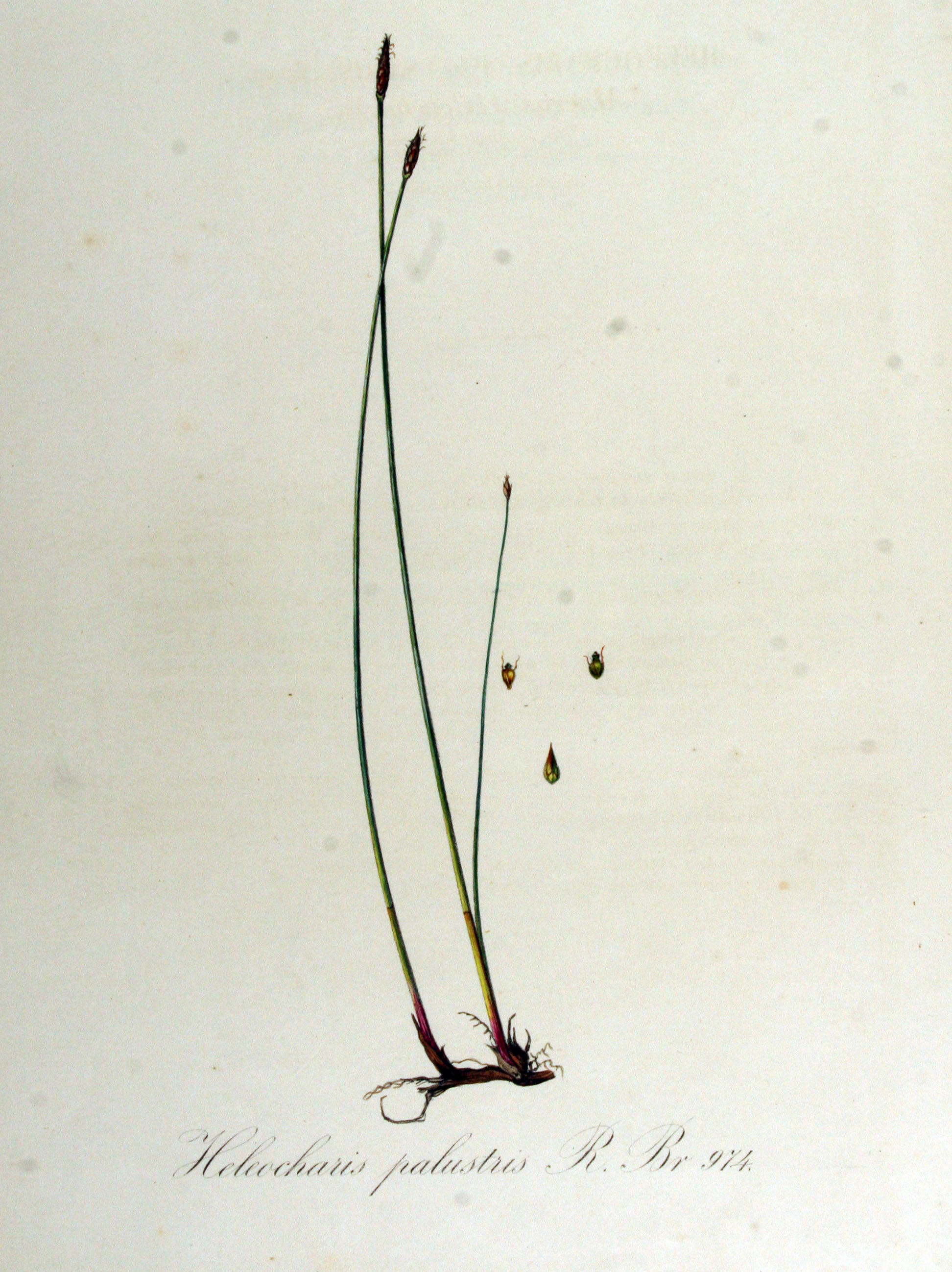 Eleocharis palustris (L.) Roem. & Schult. subsp. vulgaris Walters (Syn. Heleocharis palustris R. Br.)